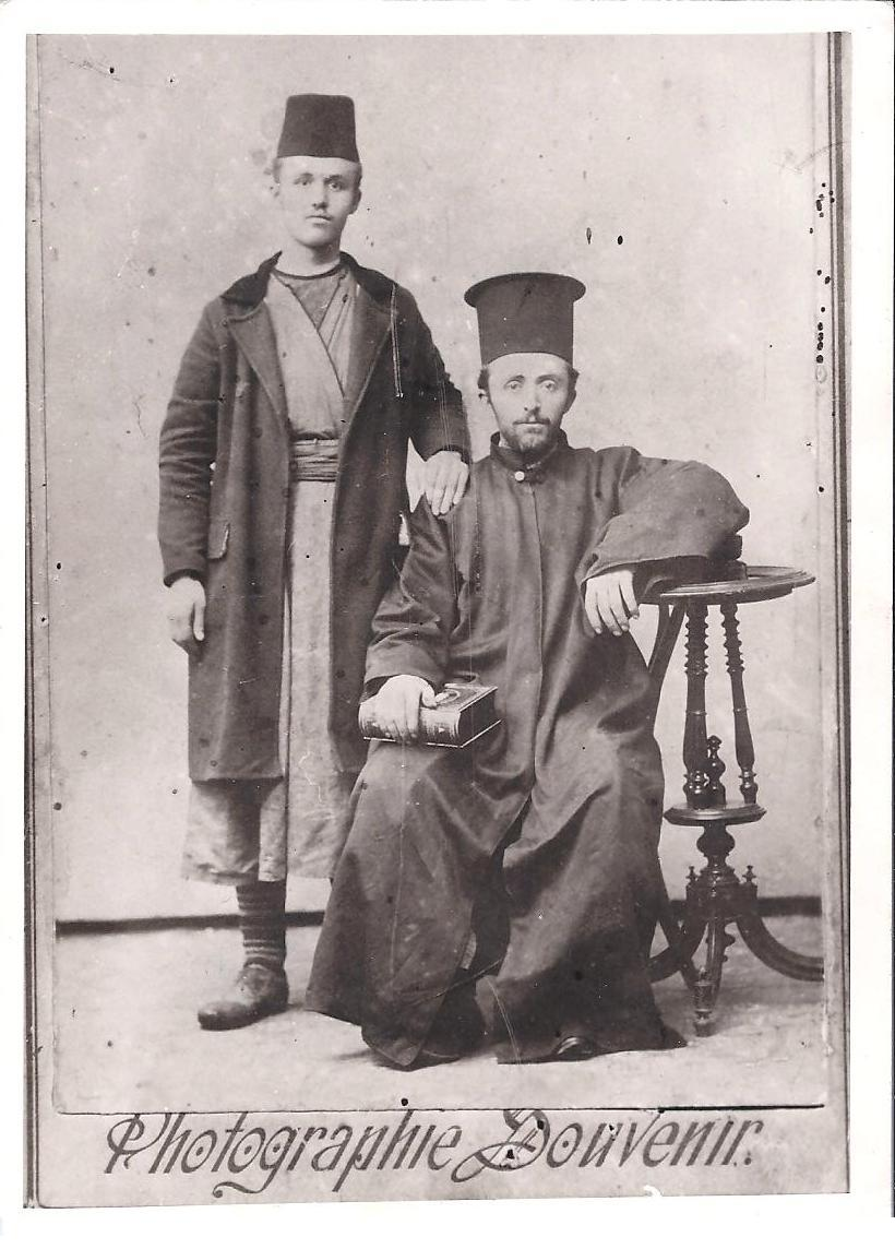 Портрет на гъркоманските братя Лазарос и Ставрос Цамис.